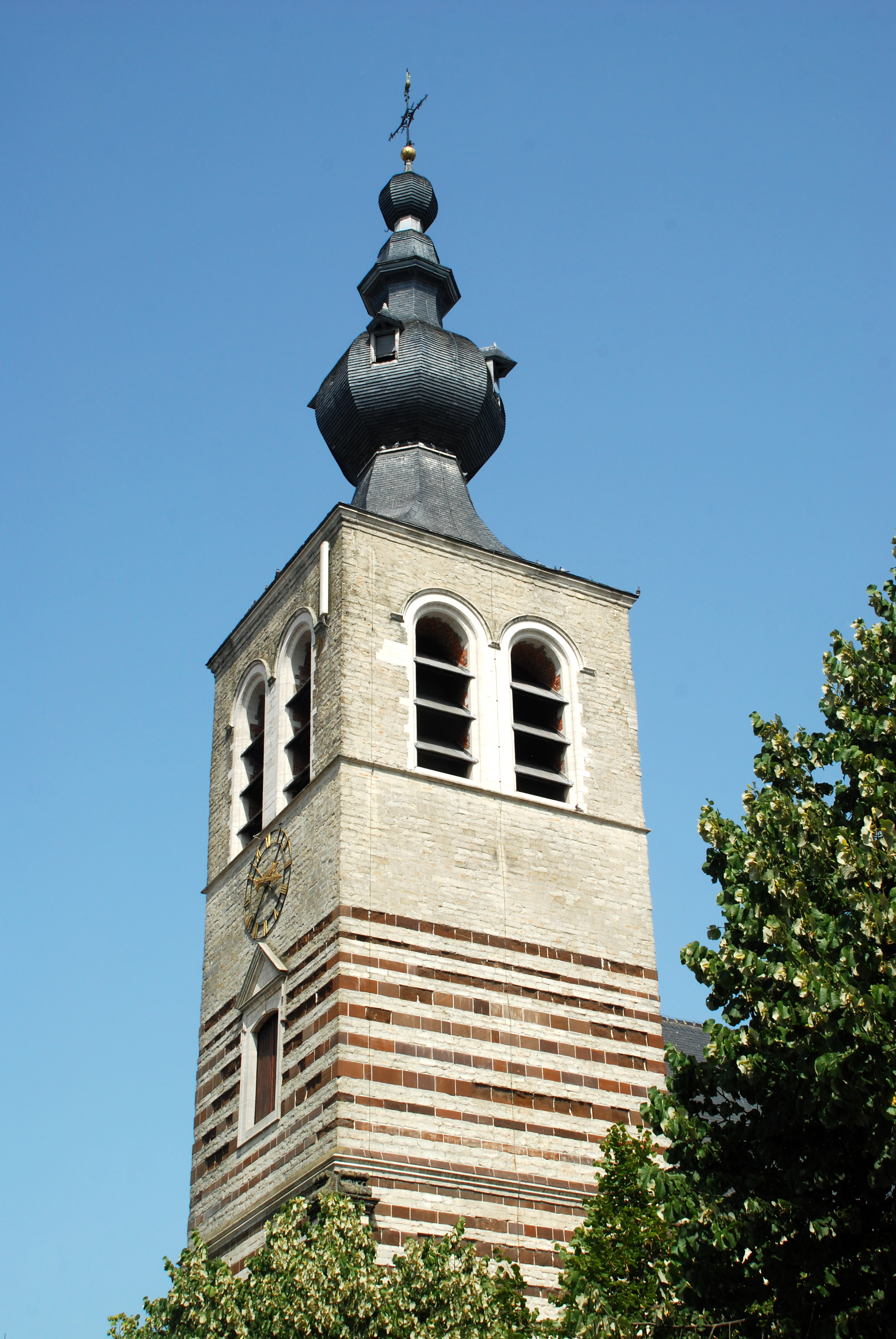 Belgique - Brabant flamand - Rotselaar - Église Saint-Jean-Baptiste de Werchter